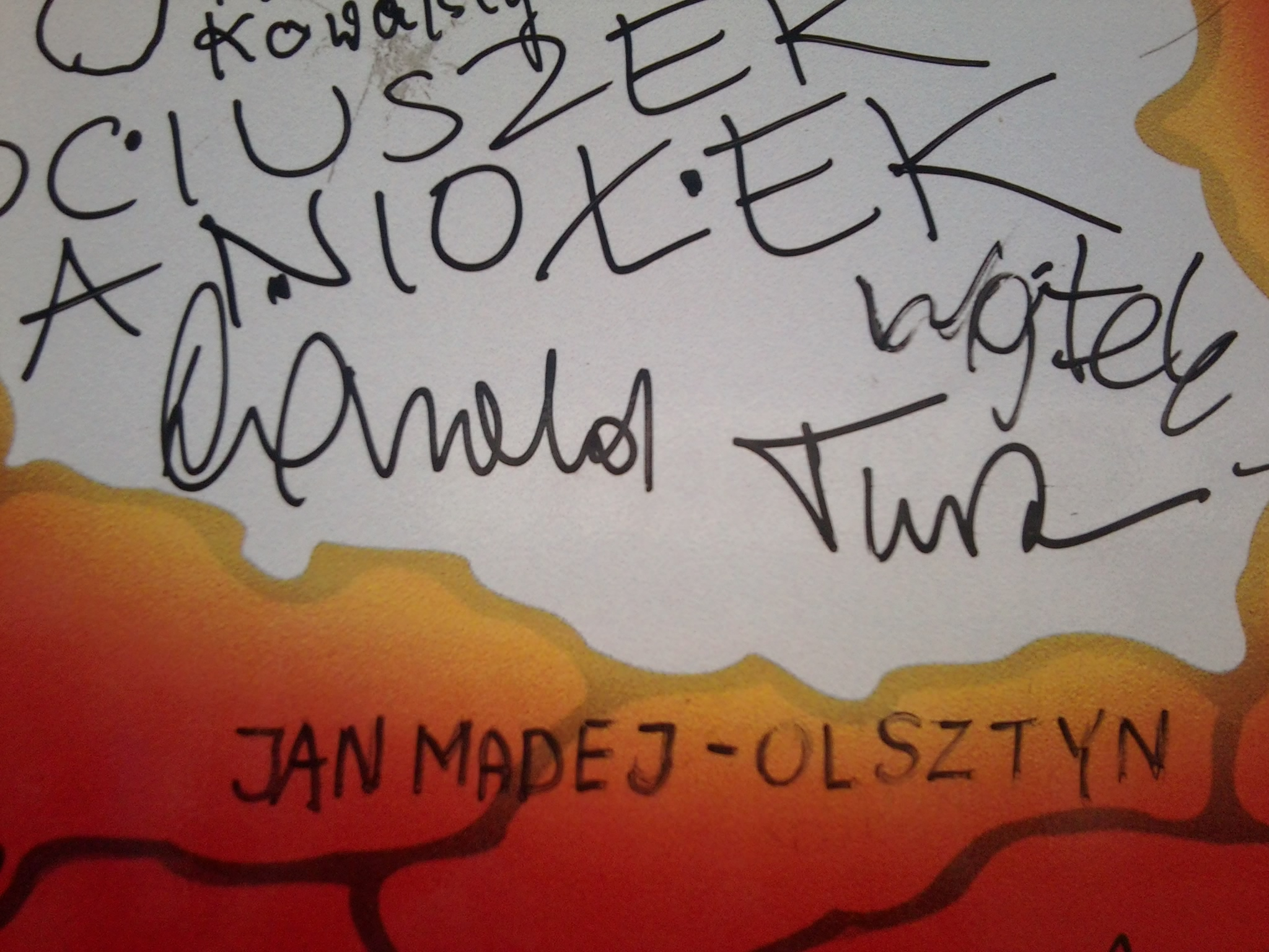 Podpis premiera Polski Donalda Tuska na lokomotywie EU44.